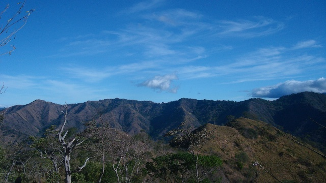 Montañas de Sabanillas de Acosta, Costa Rica.